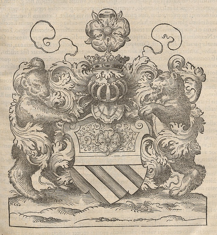 Original image description from the Deutsche Fotothek Architektur & Wappen & Graf & Bär & Rose